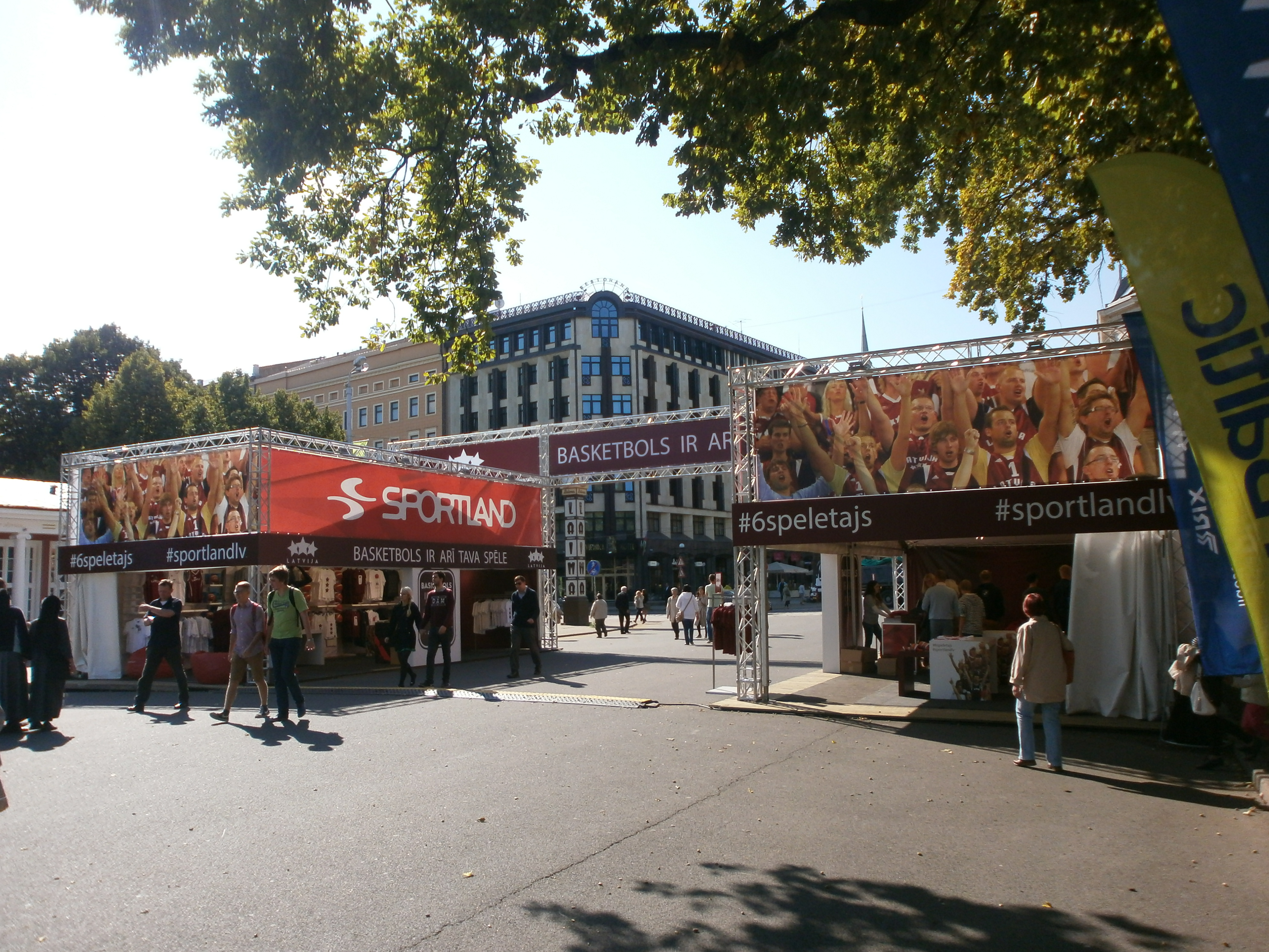 2015. gada Eiropas čempionāta basketbolā finālturnīra fanu zona Rīgā